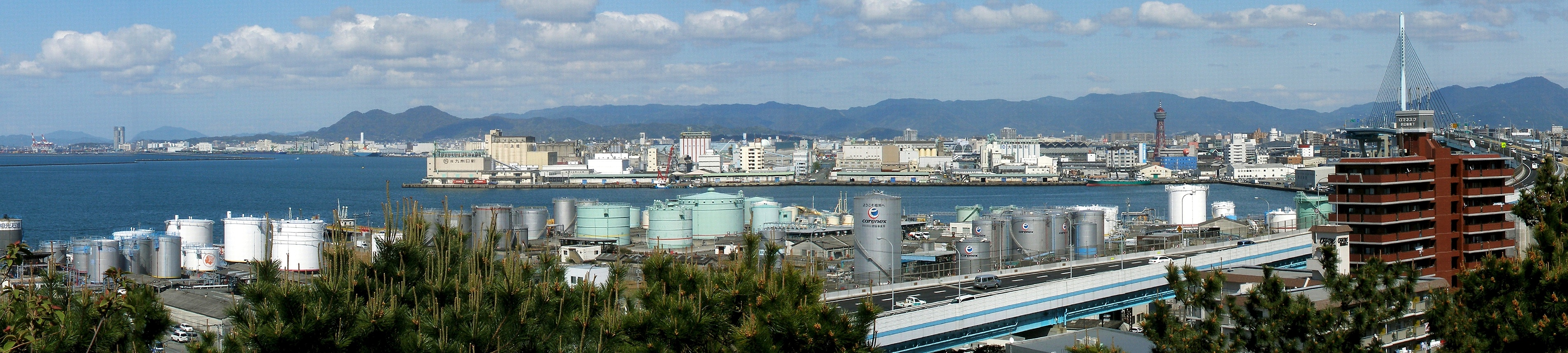 福岡市中央区にある西公園展望台からの眺め。複数枚撮影後、パノラマ合成。